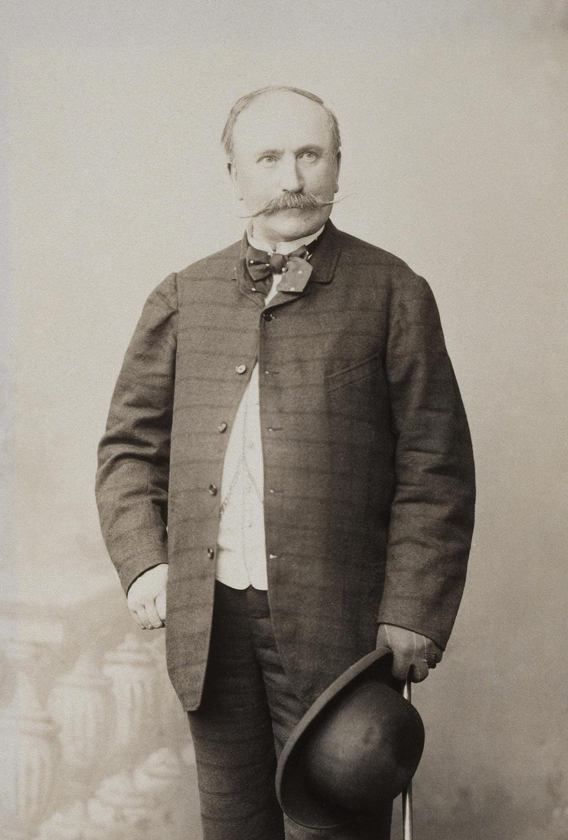 Портрет И.Г. Ностица